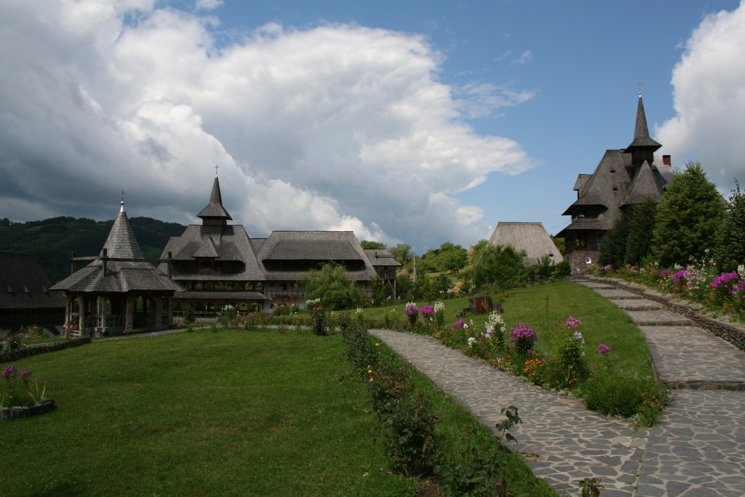 Mănăstirea Bârsana